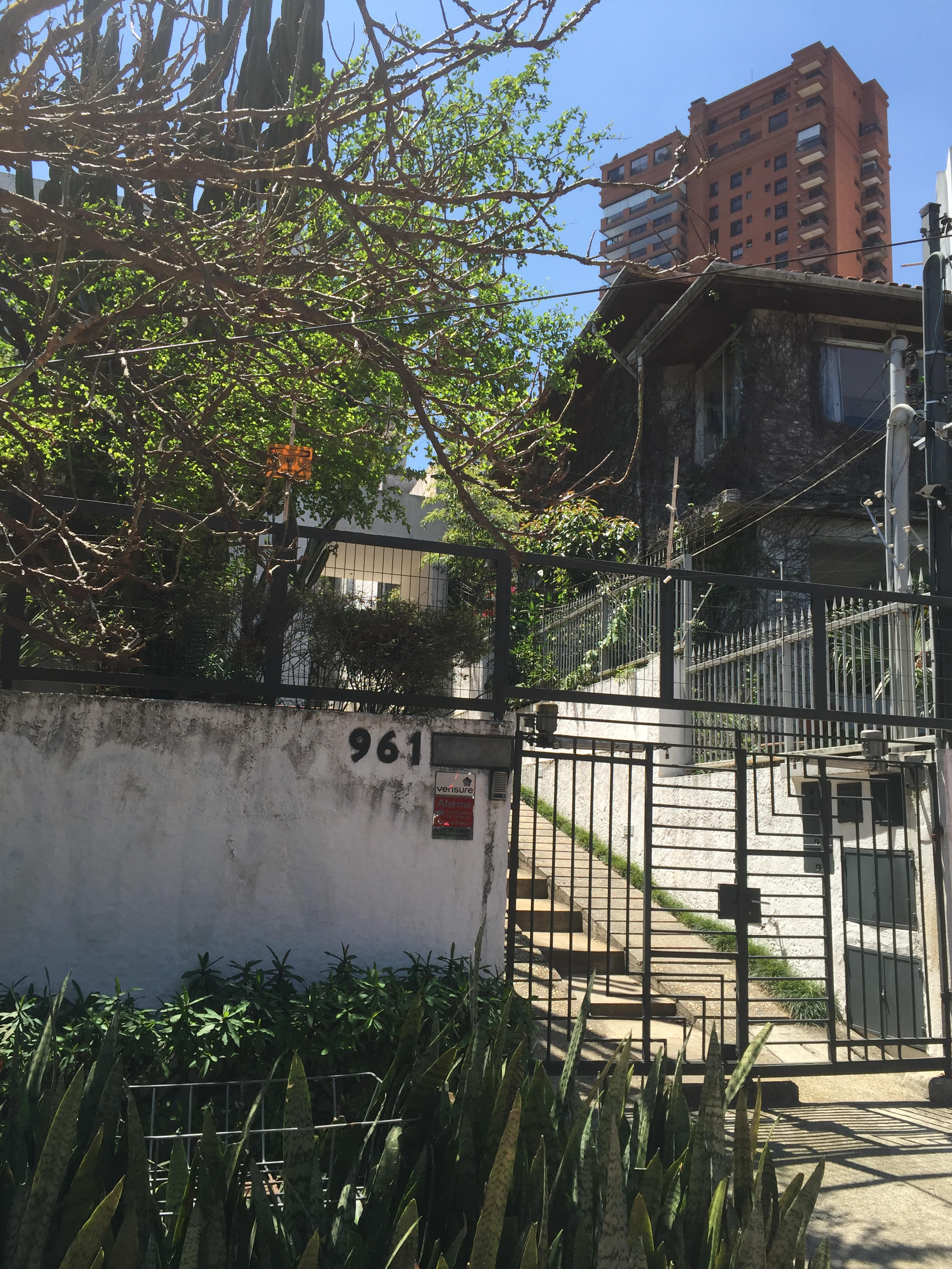 Fachada da Casa Modernista, na rua Itápolis, em São Paulo